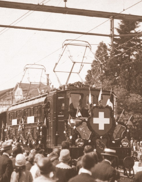 Eröffnungszug des elektrischen Bahnbetriebs Winterthur–St. Gallen–Rorschach mit einer dekorierten Ae 3/6 I in Flawil